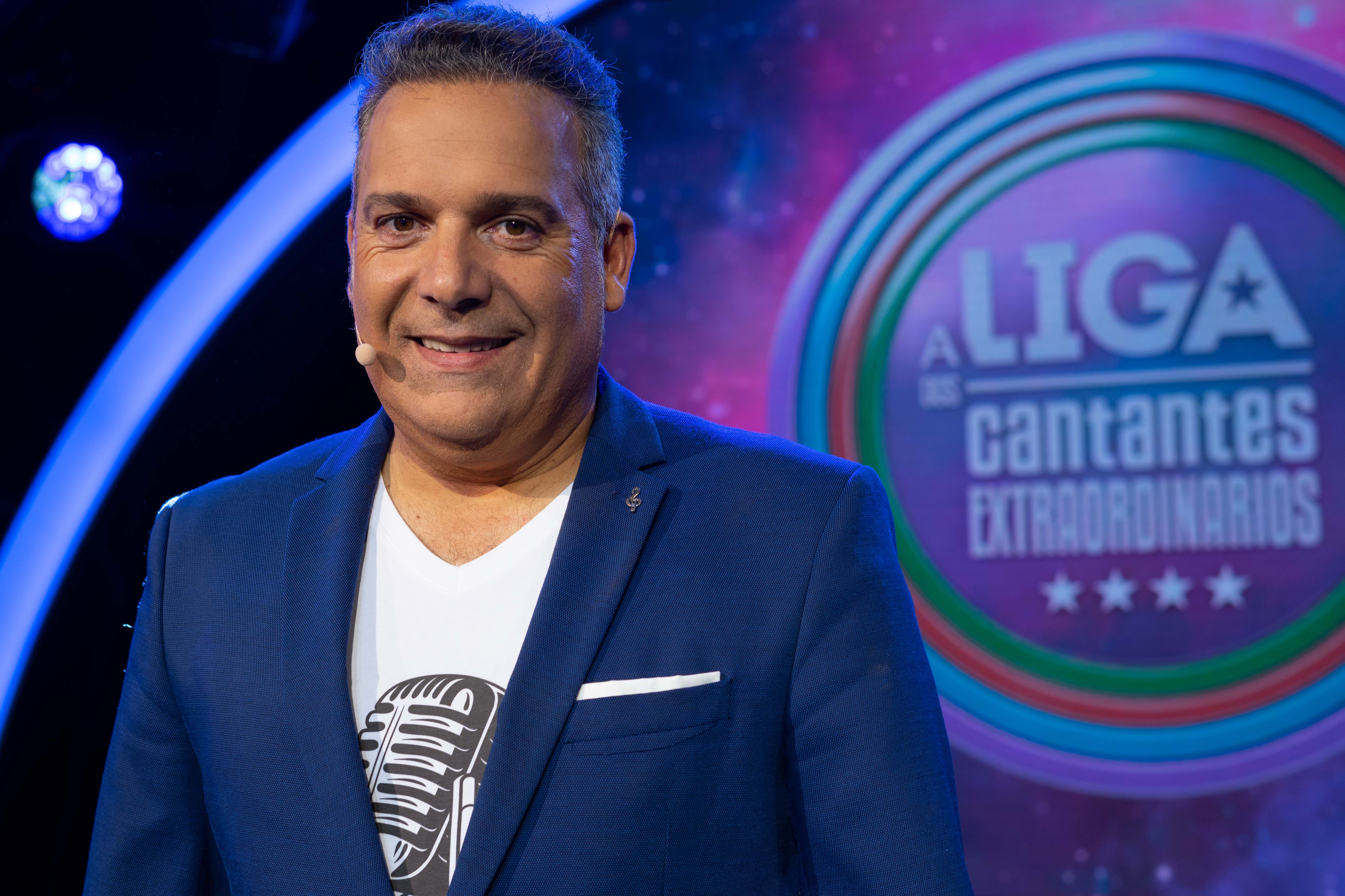 Paco Lodeiro presenta o concurso de talentos A Liga dos Cantantes Extraordinarios